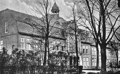 Bussum: Iepenlaan 30; De voorzijde van het ziekenhuis nadat in 1917 aan de linkerzijde een gedeelte tot een breedte van vier ramen is aangebouwd. Gezien van links-voor vanuit de voortuin. (1919)